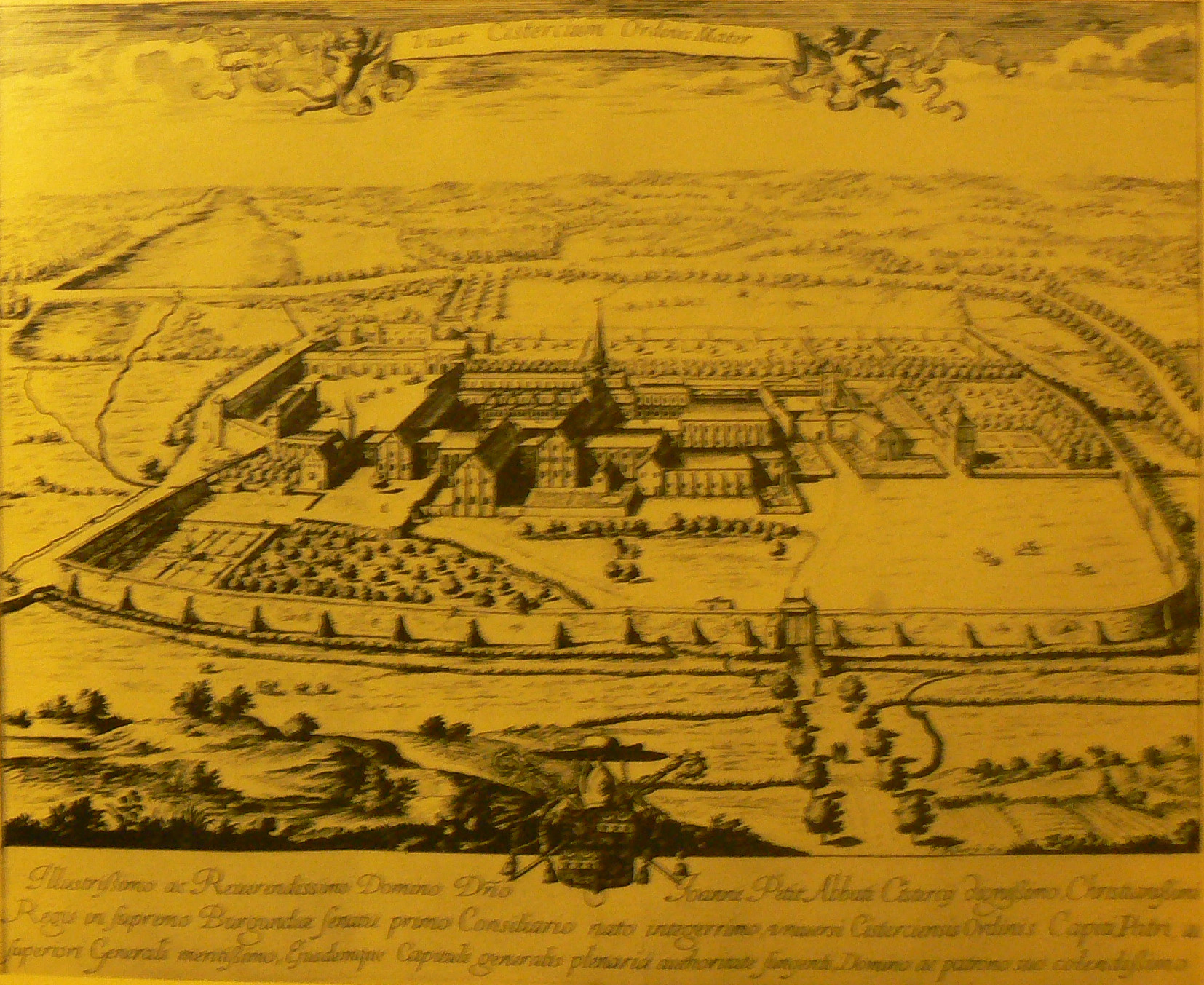 Abbaye de Citeaux